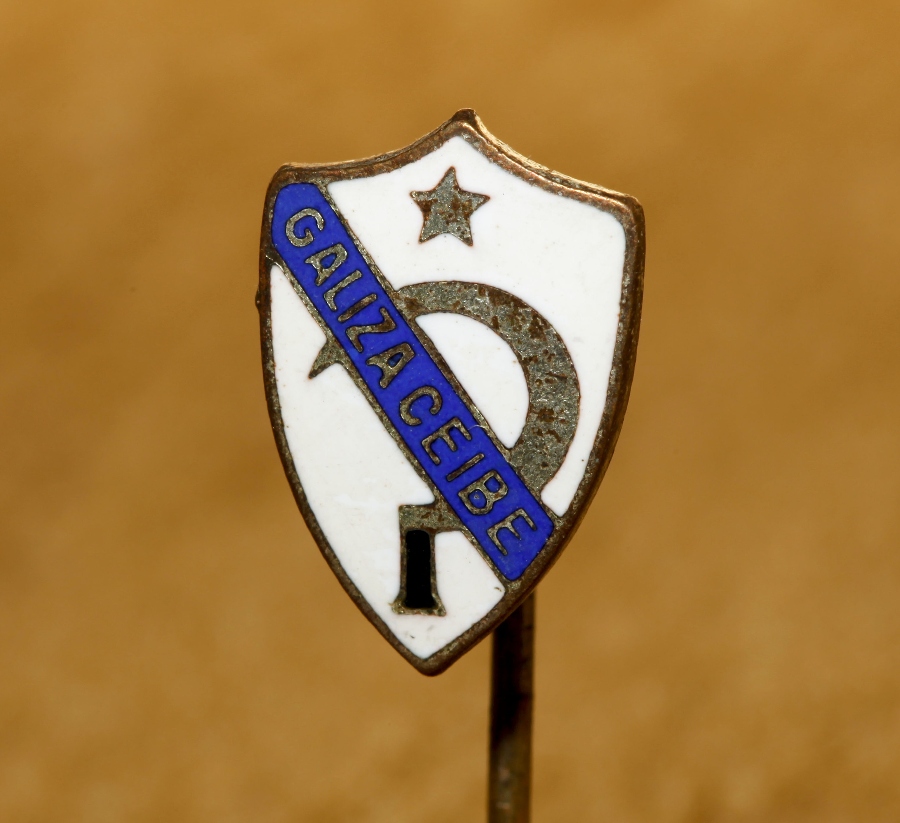 Insignia de 1929 da Sociedade Nazonalista Pondal, unha escisión radicalizada da Irmandade Nazonalista Galega e pioneira do arredismo -independentismo- galego nos anos 20 xunto co Comité Revoluzonario Arredista Galego de La Habana.